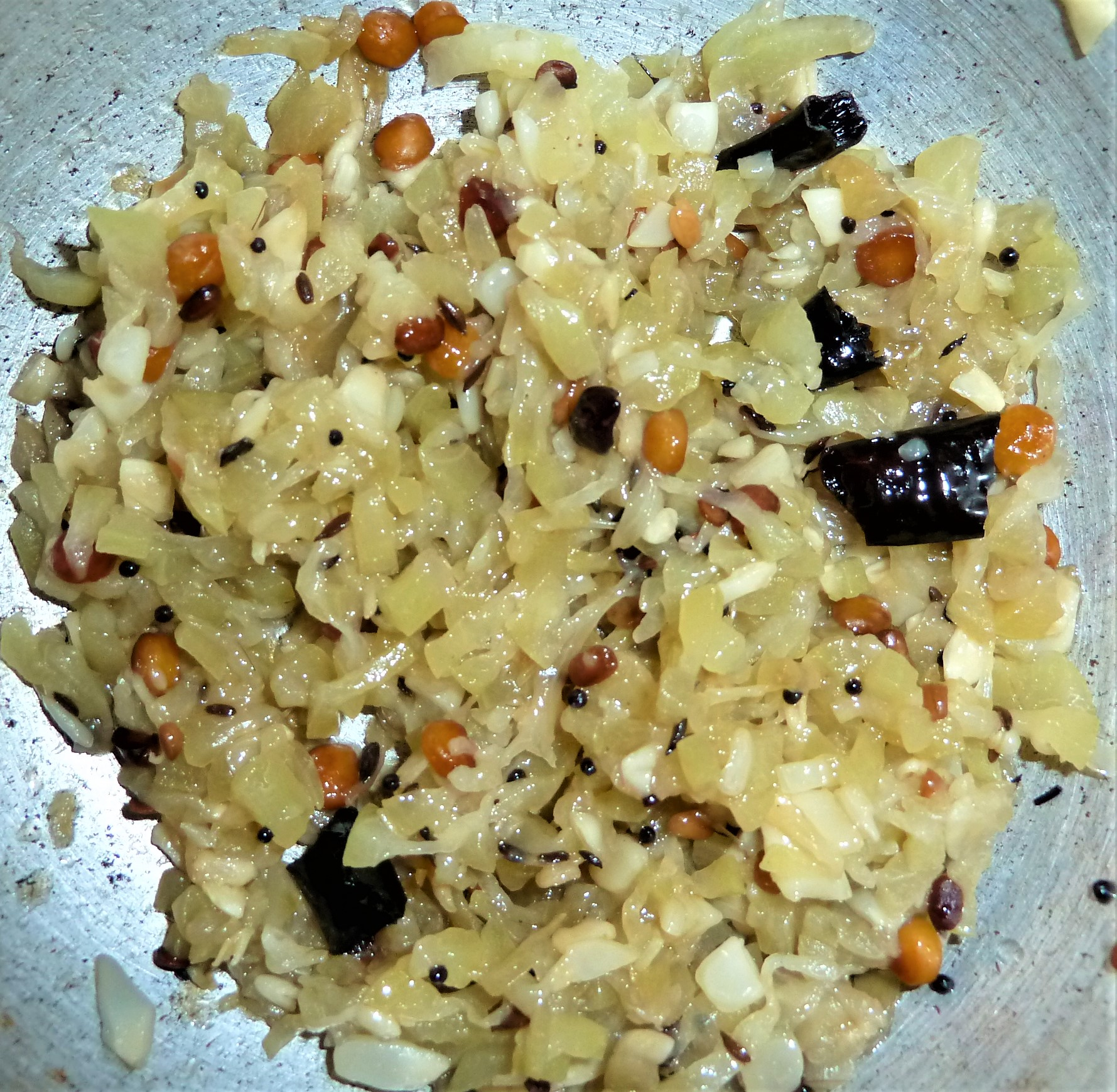 సొరకాయ పోపు కూర